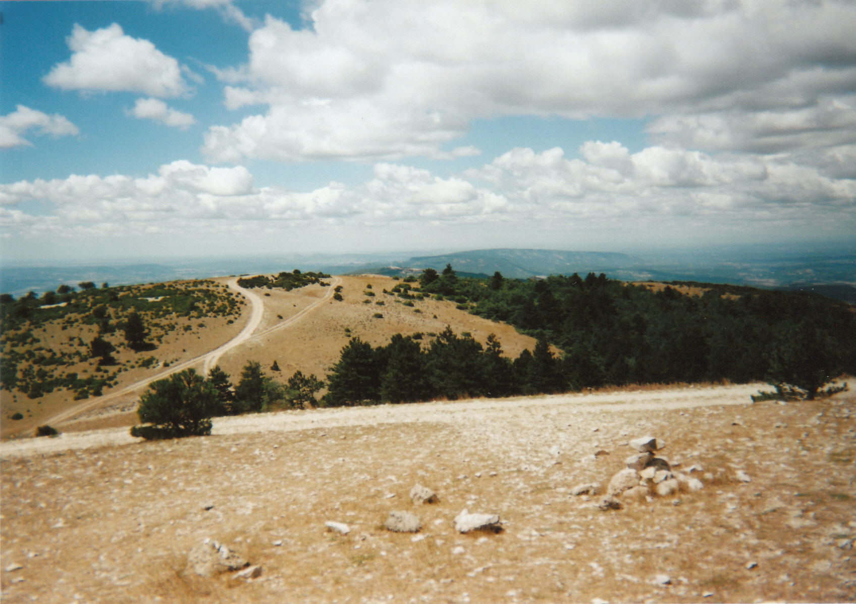 Panorama à l'Ouest depuis le Mourre Nègre